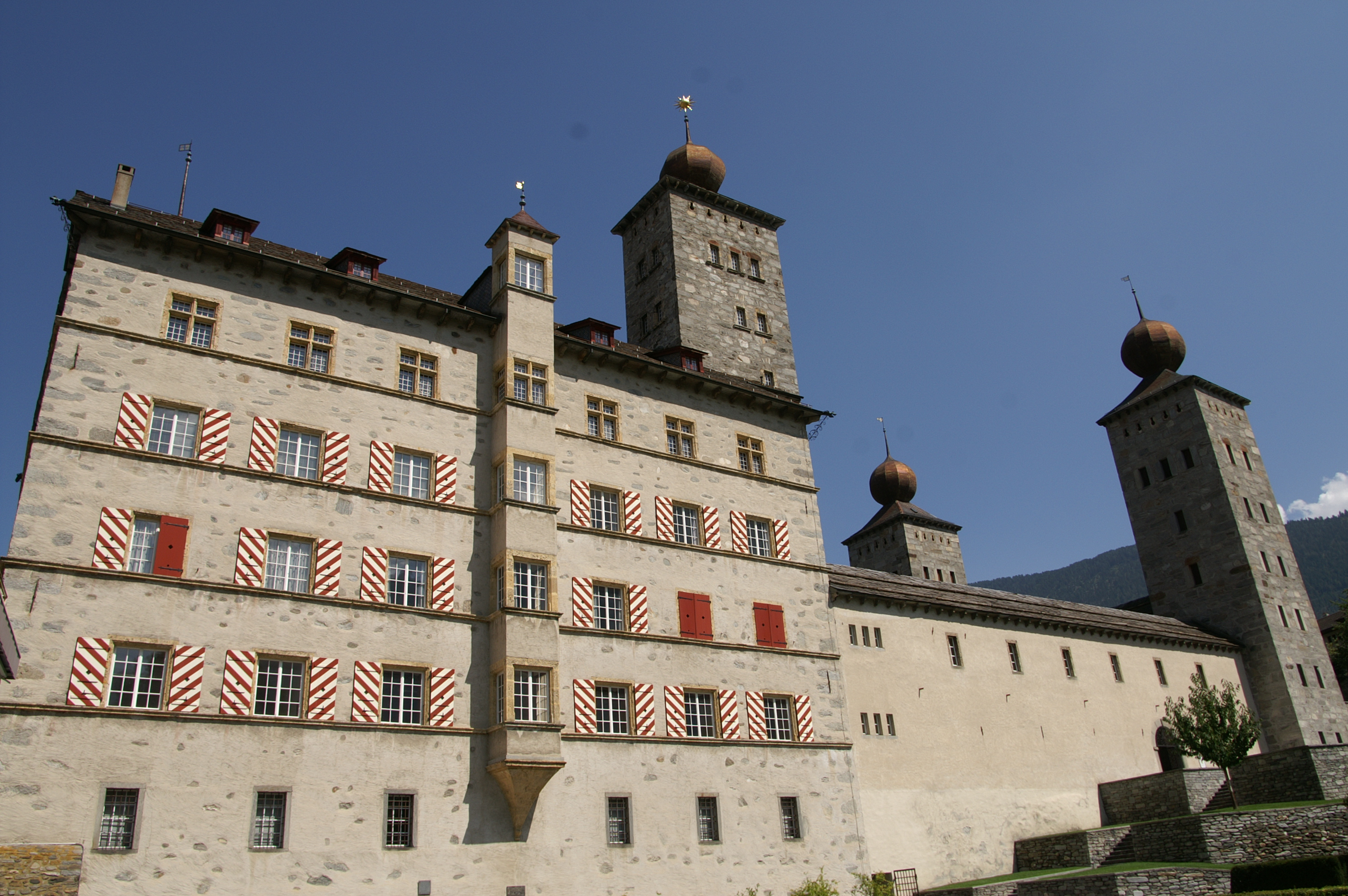 Le château de Stockalper.